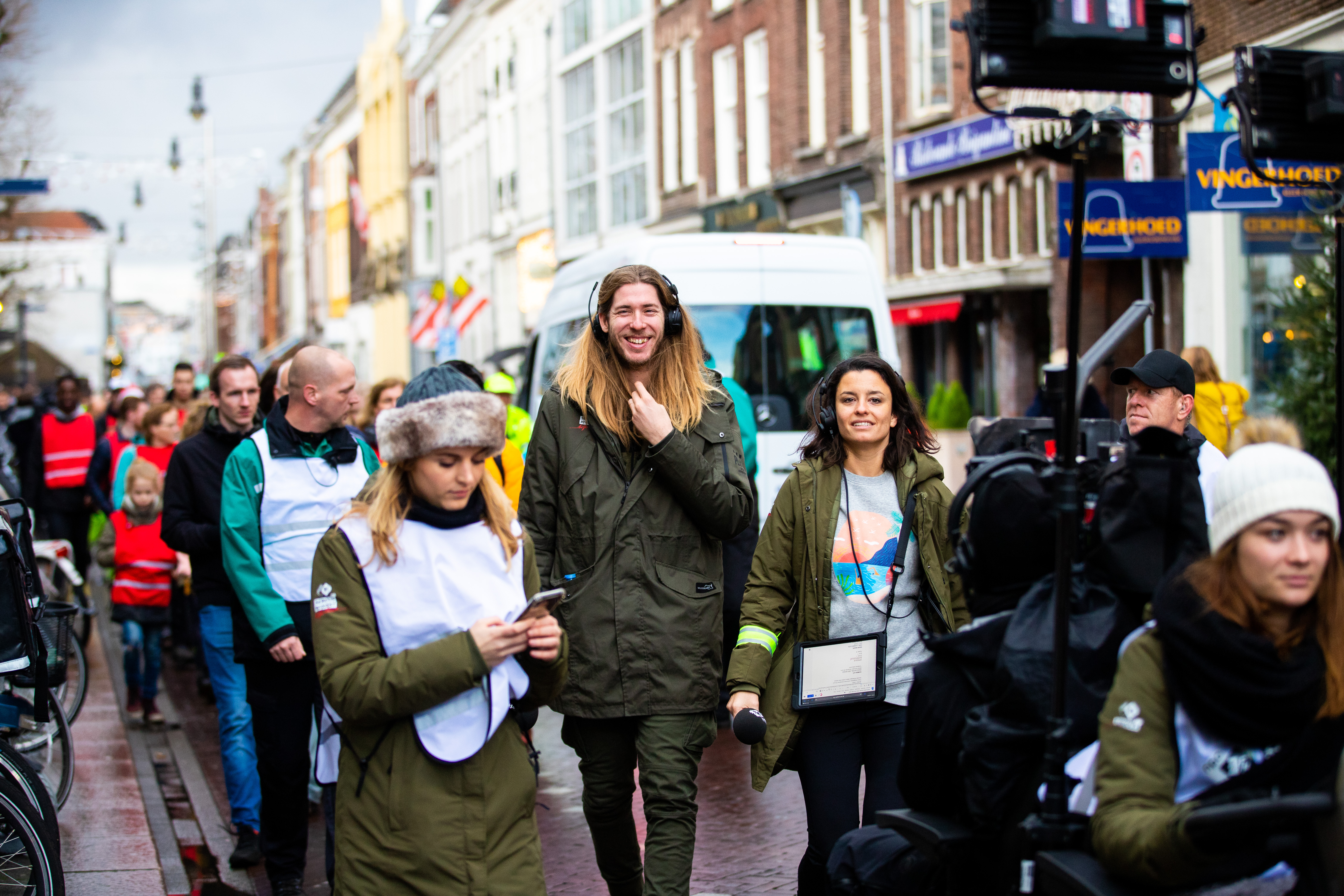 Dj's Frank van der Lende en Eva Koreman van NPO 3FM in Den Bosch tijdens Serious Request 2019